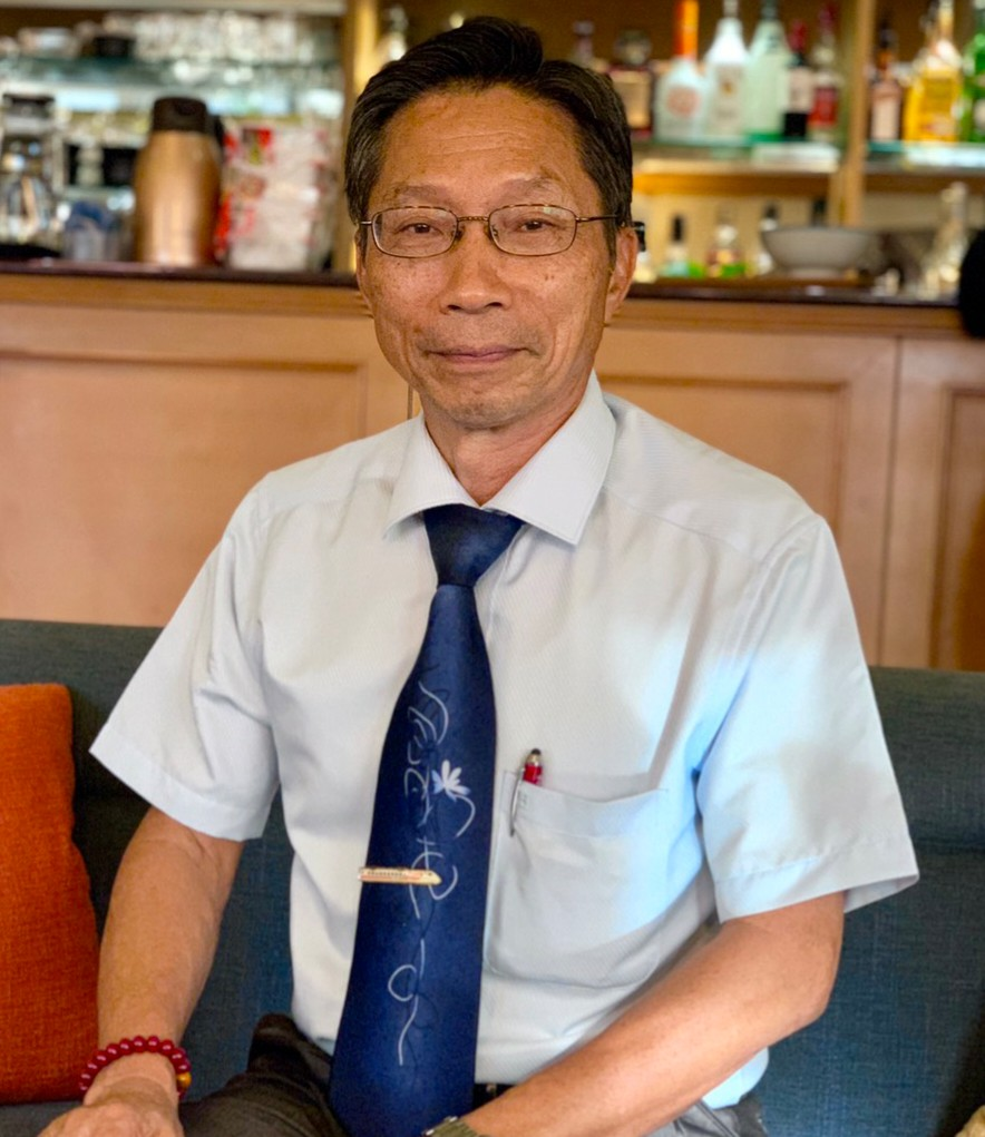 台灣教育工作者-潘扶德